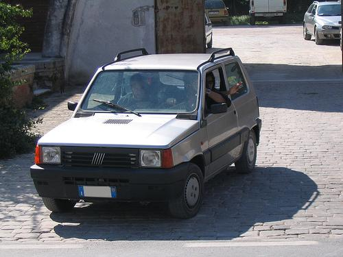 fiat Panda